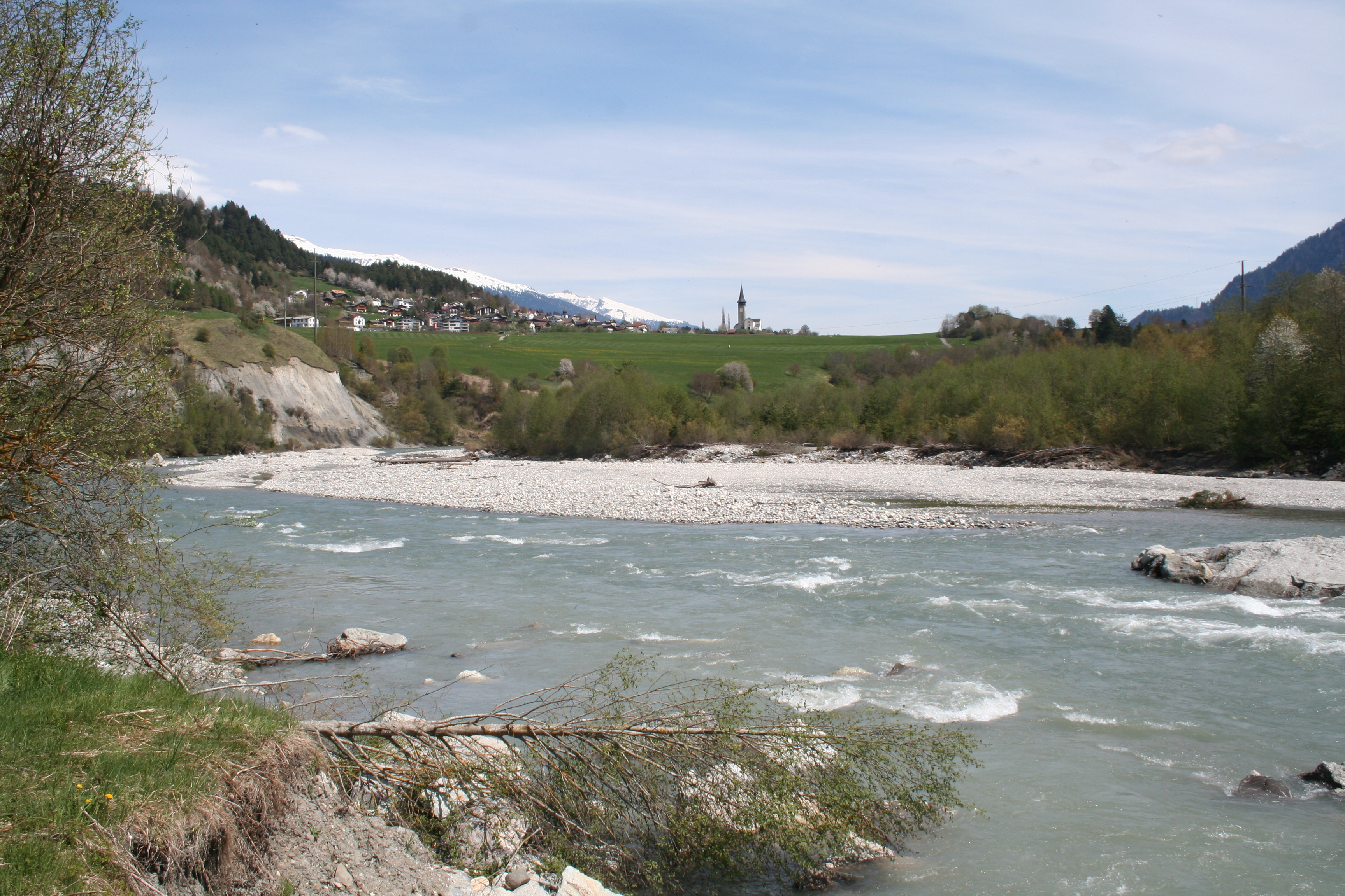 Vorderrhein bei Schluein, im Hindergrund Sagogn